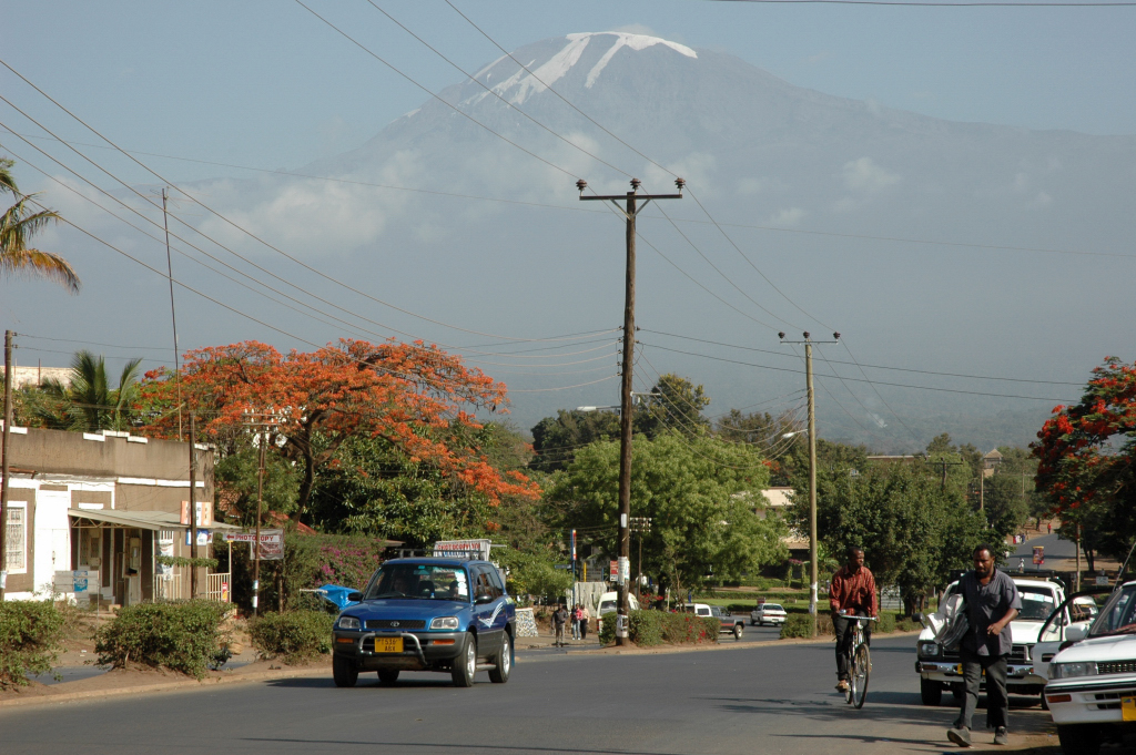 View of Kilimajaro, Moshi, Tanzania